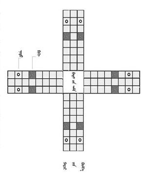 中文（台灣）: 帕日吉棋盤